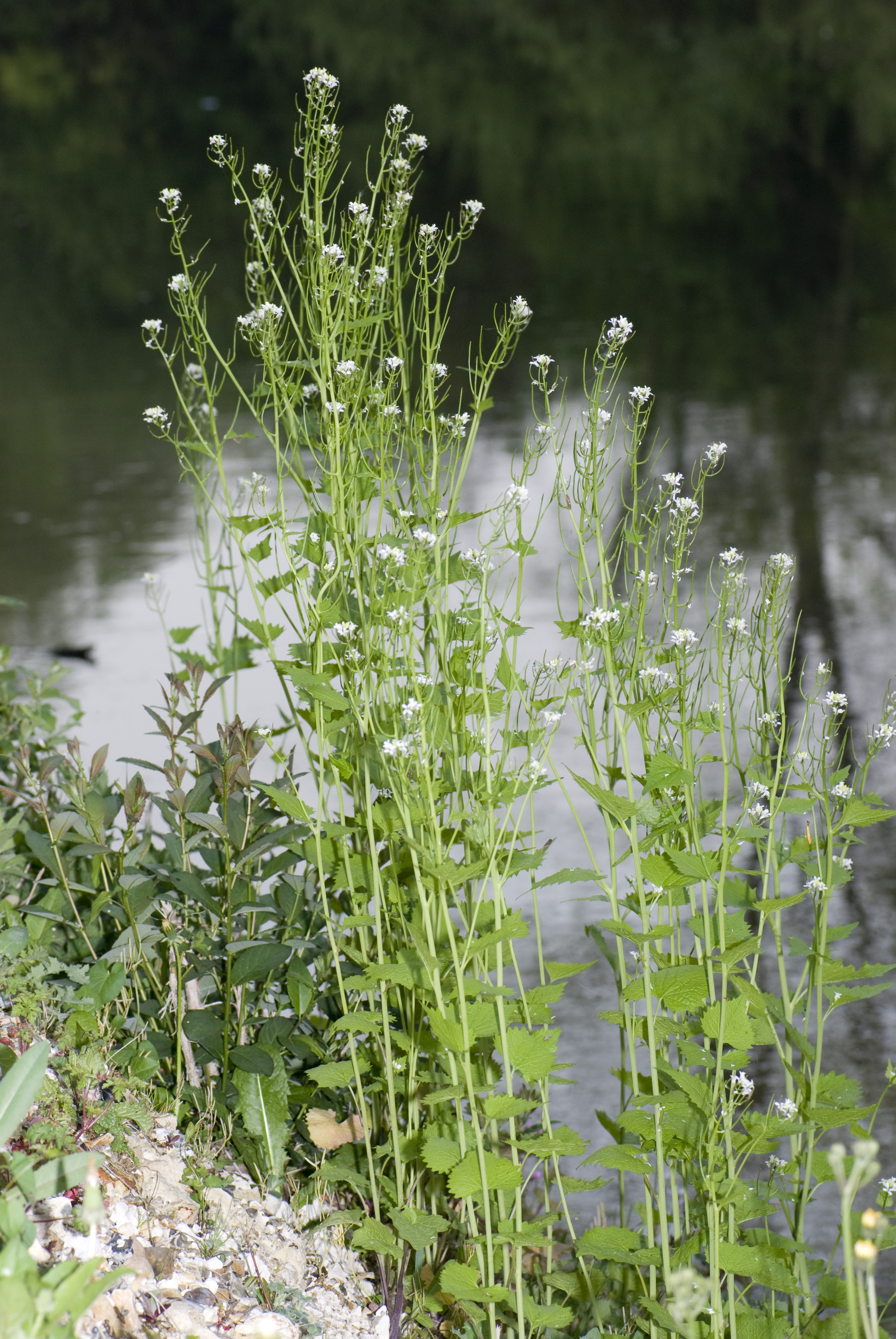 Alliaria petiolata - Alliaire officinalle - Marais de Belloy-sur-Somme (Somme) 26/04/2007